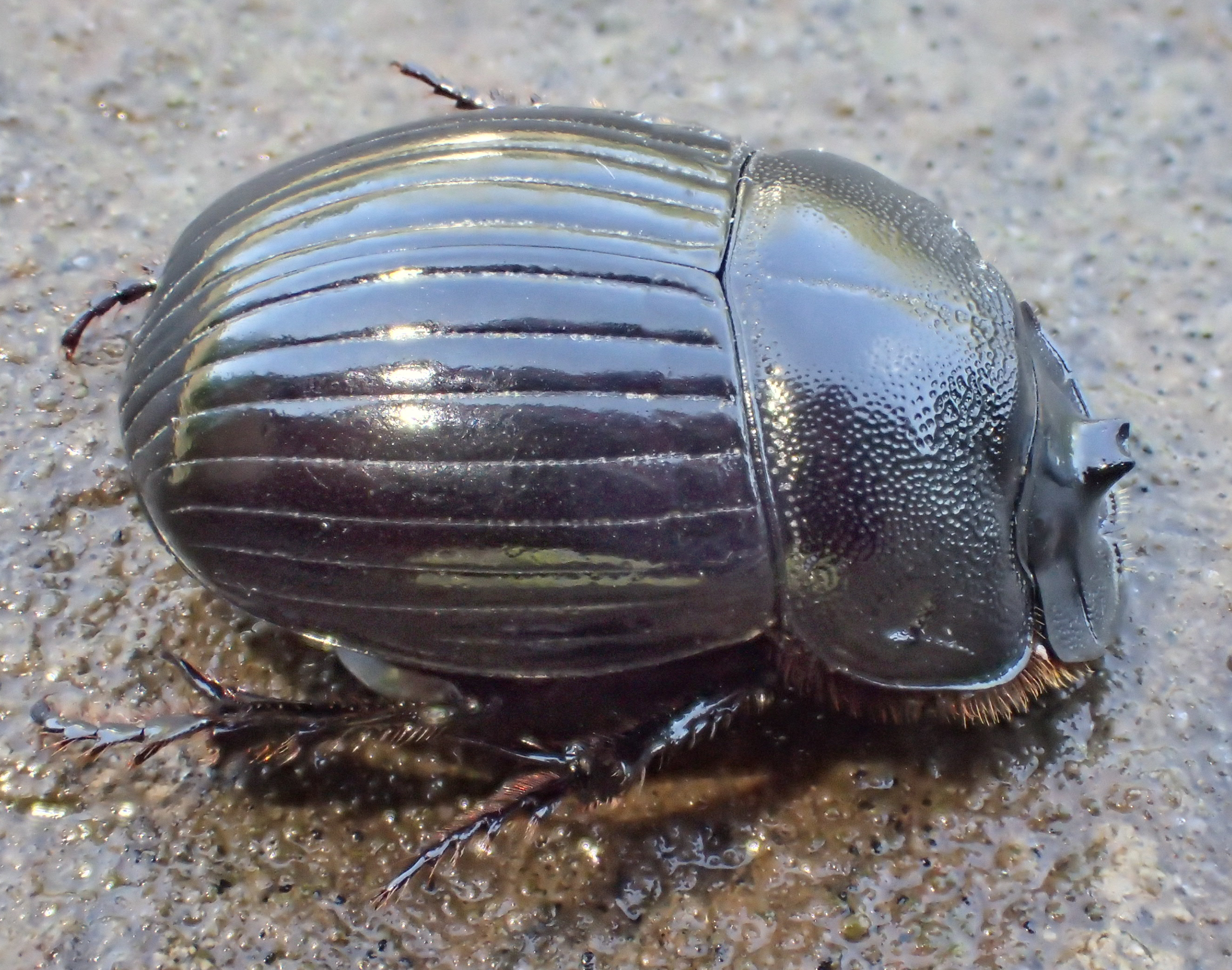 Copris lunaris Weibchen, Teilansicht, aus Griechenland, Epirus, nordwestlich von Ioannina, 783 m hoch